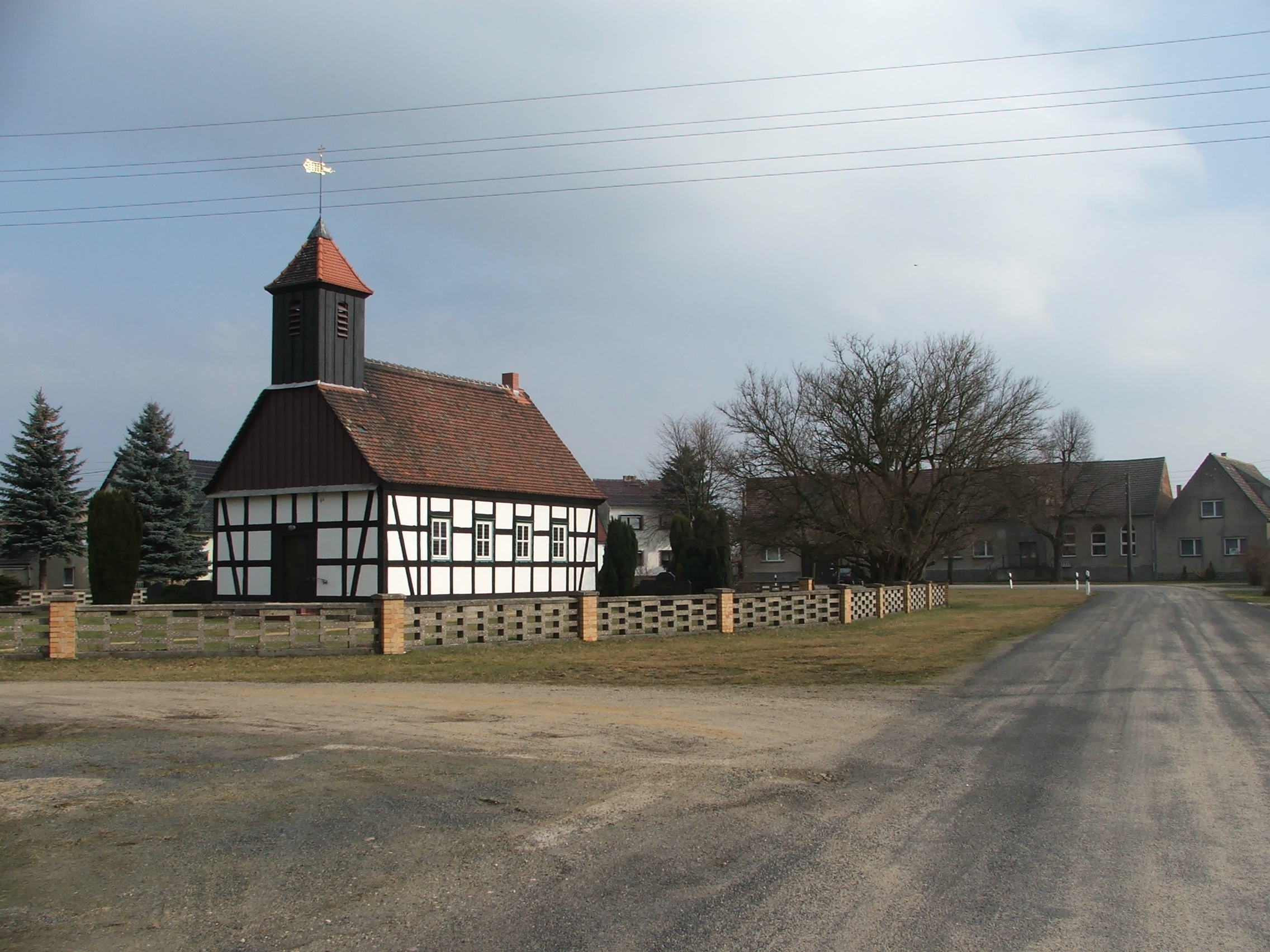 Nexdorf